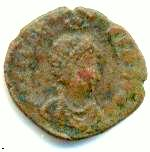 Aelia Eudoxia coin - head